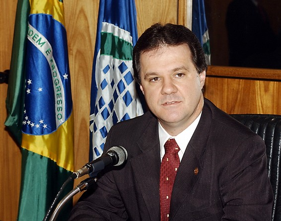 O ministro interino da Previdência Social, Carlos Eduardo Gabas, reúne-se com representantes de aposentados e pensionistas para discutir os 5% de reajuste previstos na MP 291.